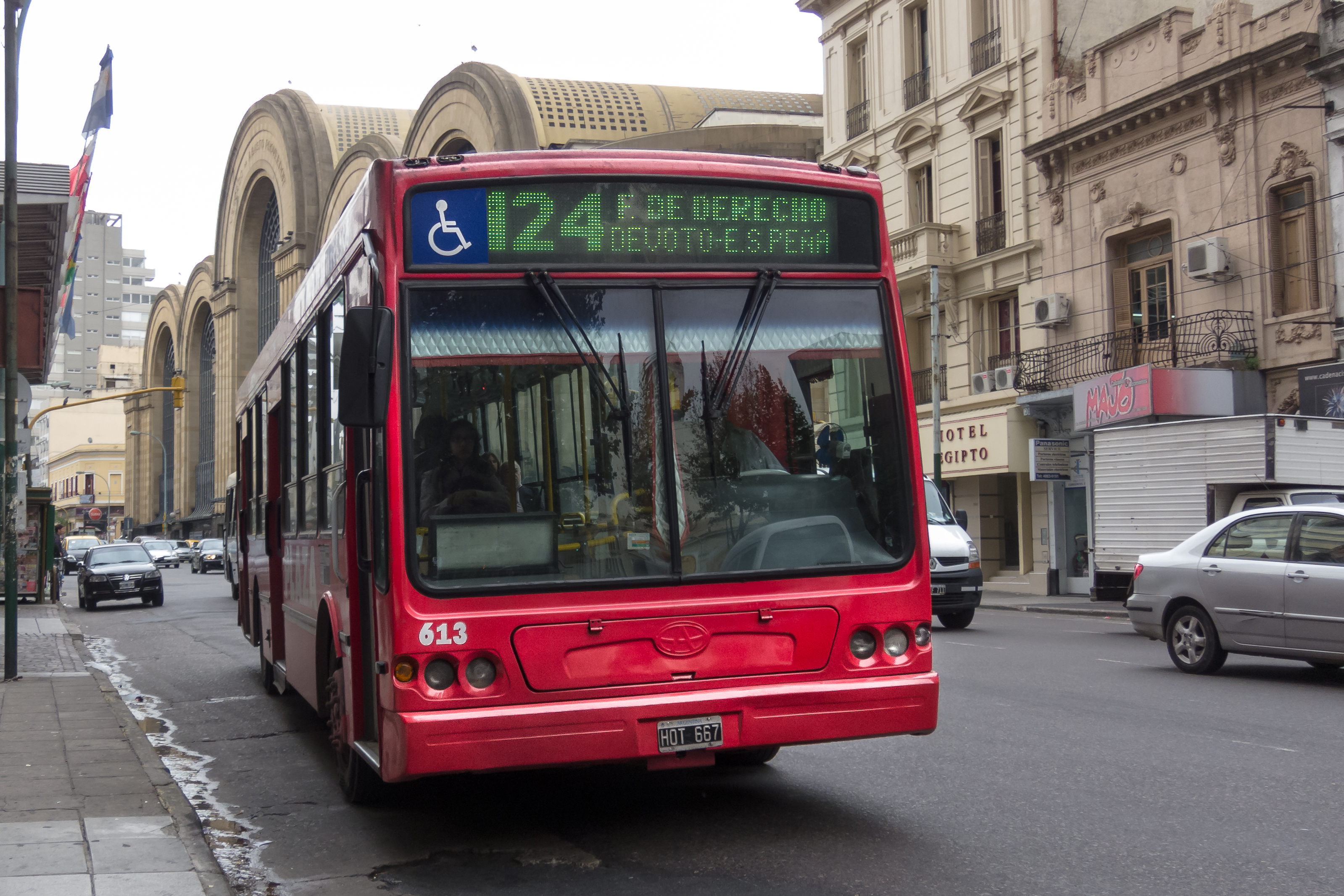 Colectivo de la Línea 124, interno 613, carrocería TATSA, chasis TATSA, matrícula HOT667. Buenos Aires, Argentina.